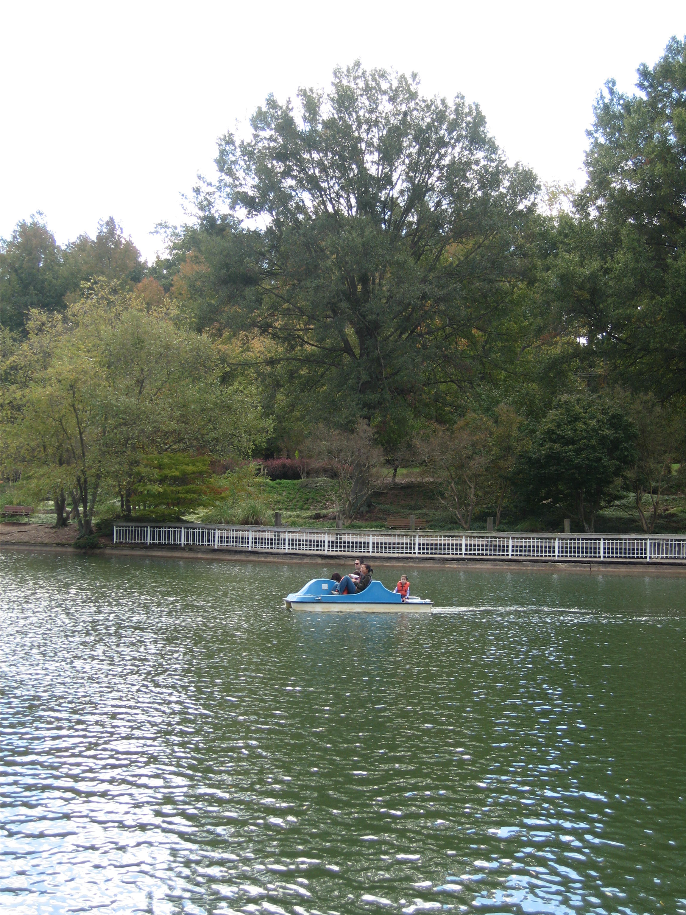 Alexandra Fox